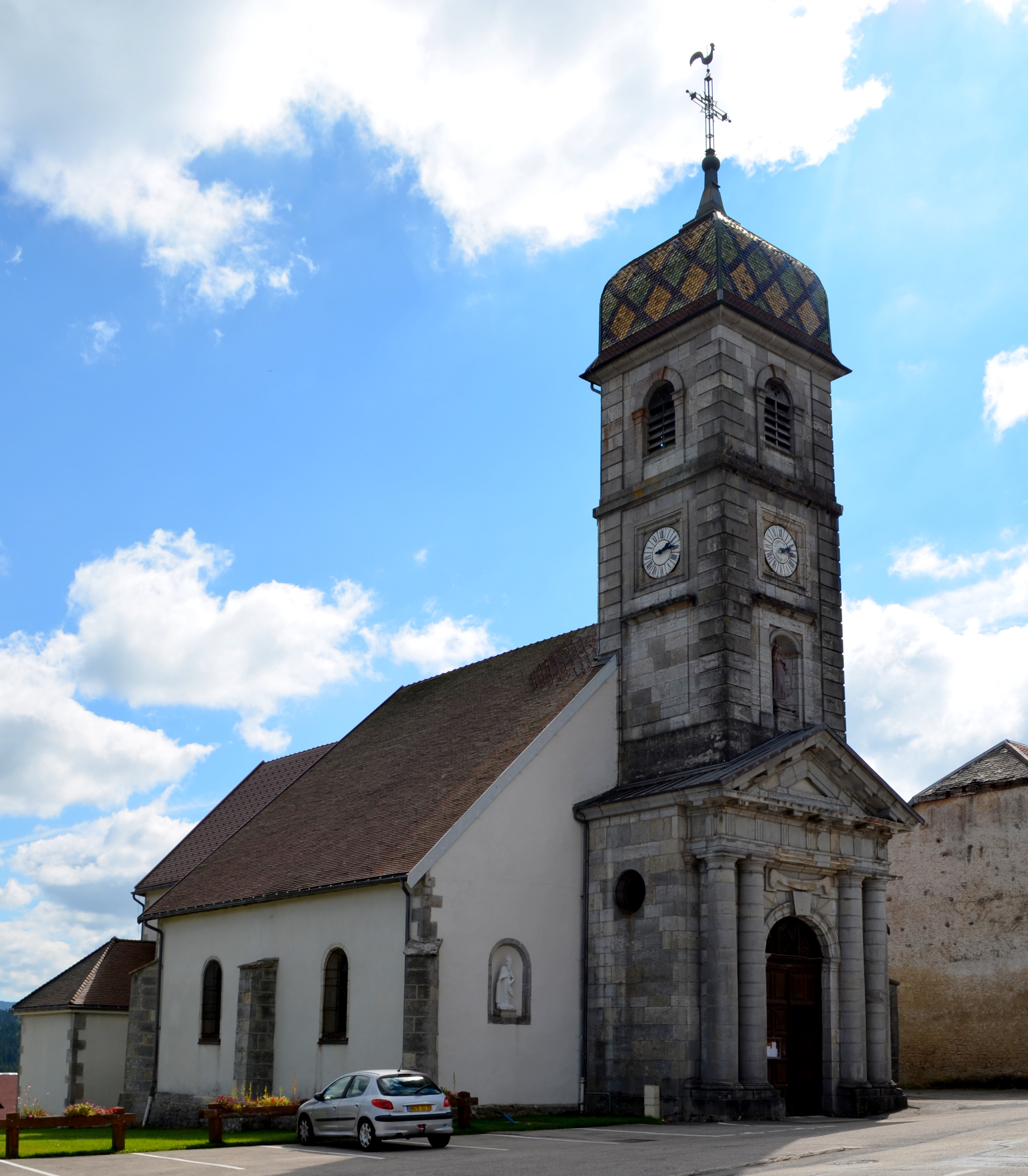 La Chaux-du-Dombief, Jura, France.